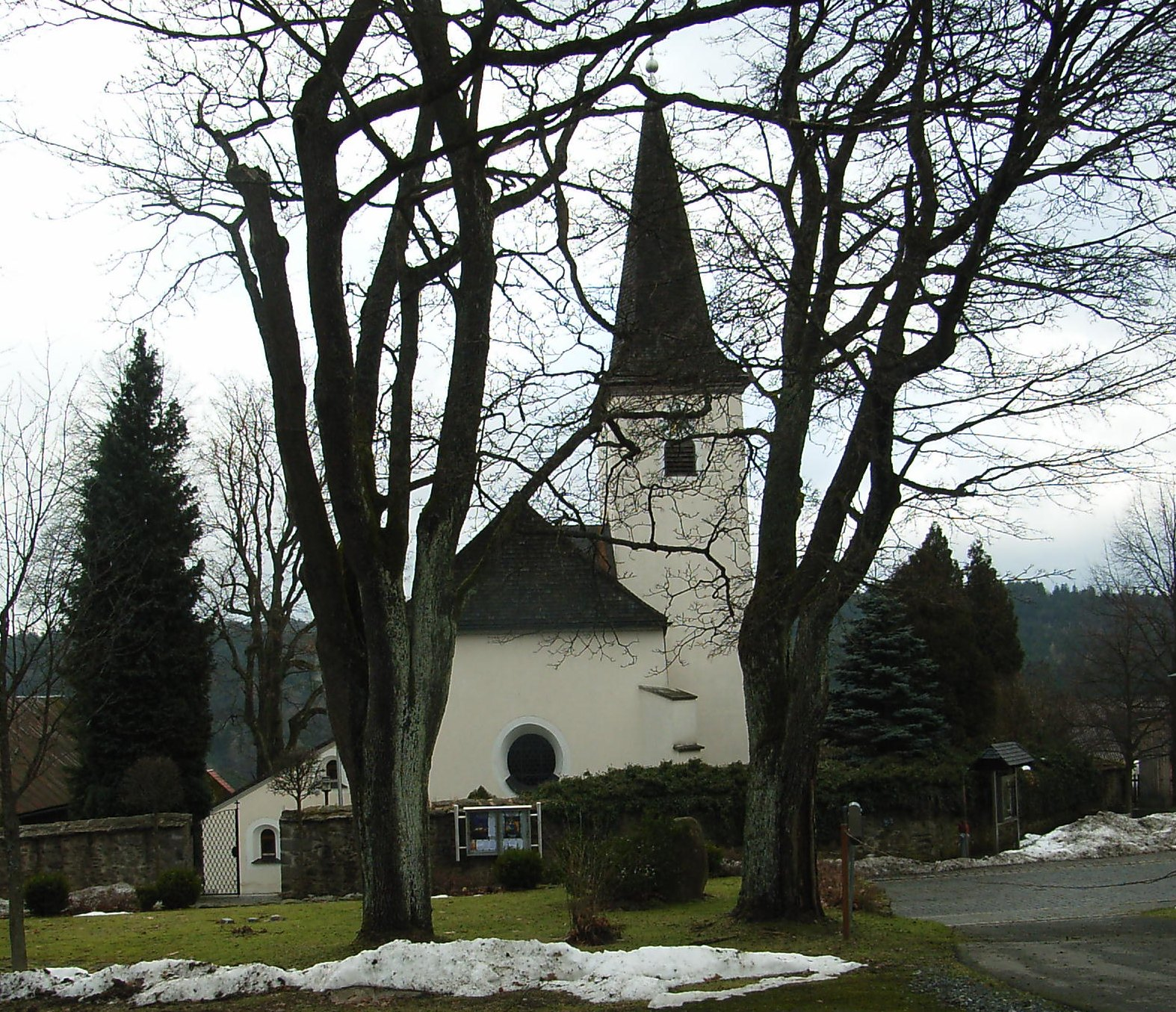 Wallfahrtskirche Mariä Himmelfahrt in Stadlern (2012)